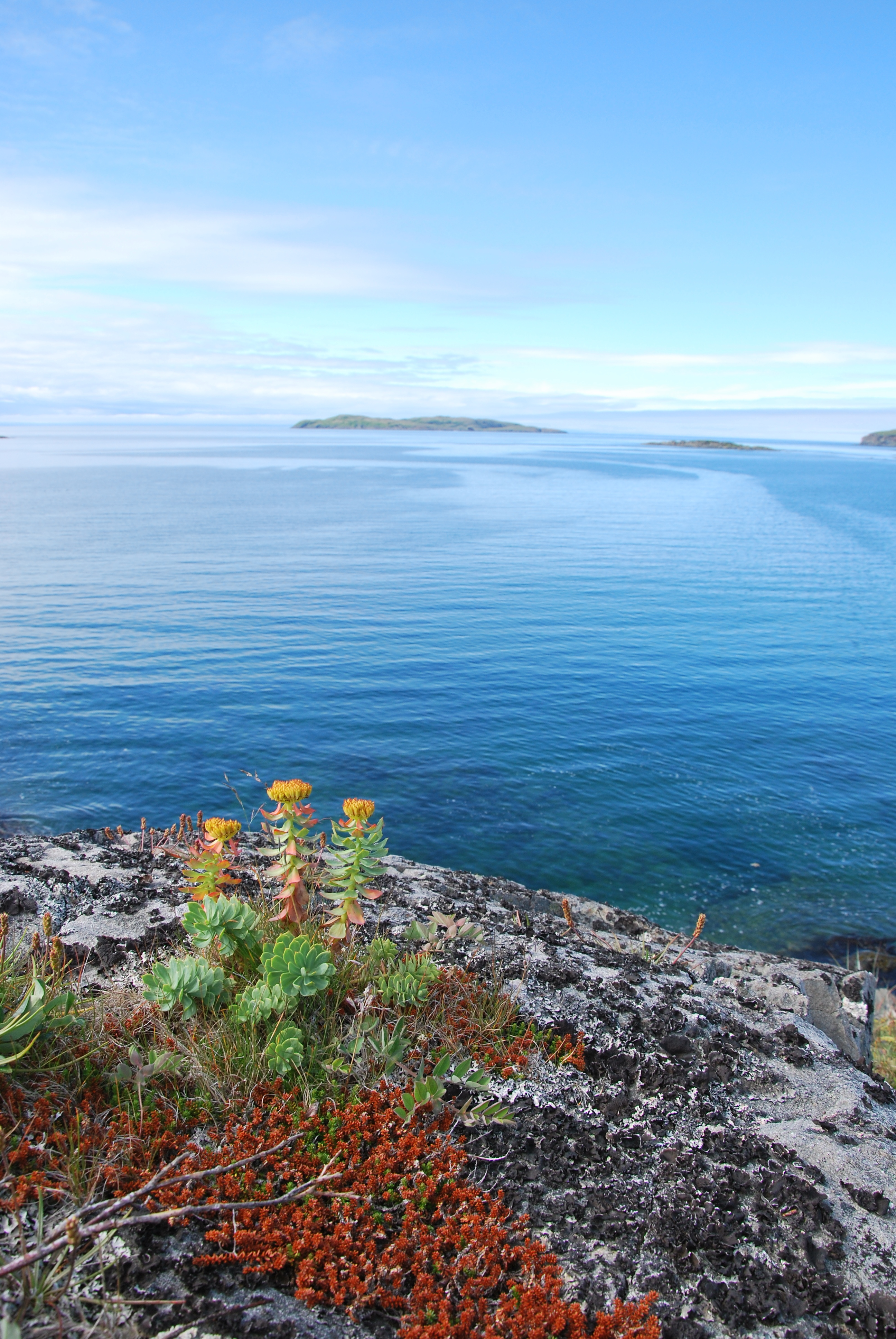 Rhodiole (rhodiola rosea), plante subarctique, à L'Anse aux Meadows, Terre-Neuve. Roseroot (rhodiola rosea), Subarctic Plant, L'Anse aux Meadows, Newfoundland and Labrador.